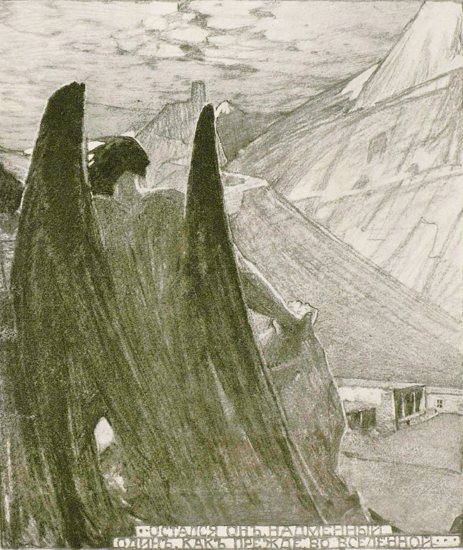 Illustrazione per il poema di M. Ju. Lermontov "Il Demone" di Alfred Rudol'fovič Ėberling (1872-1951)